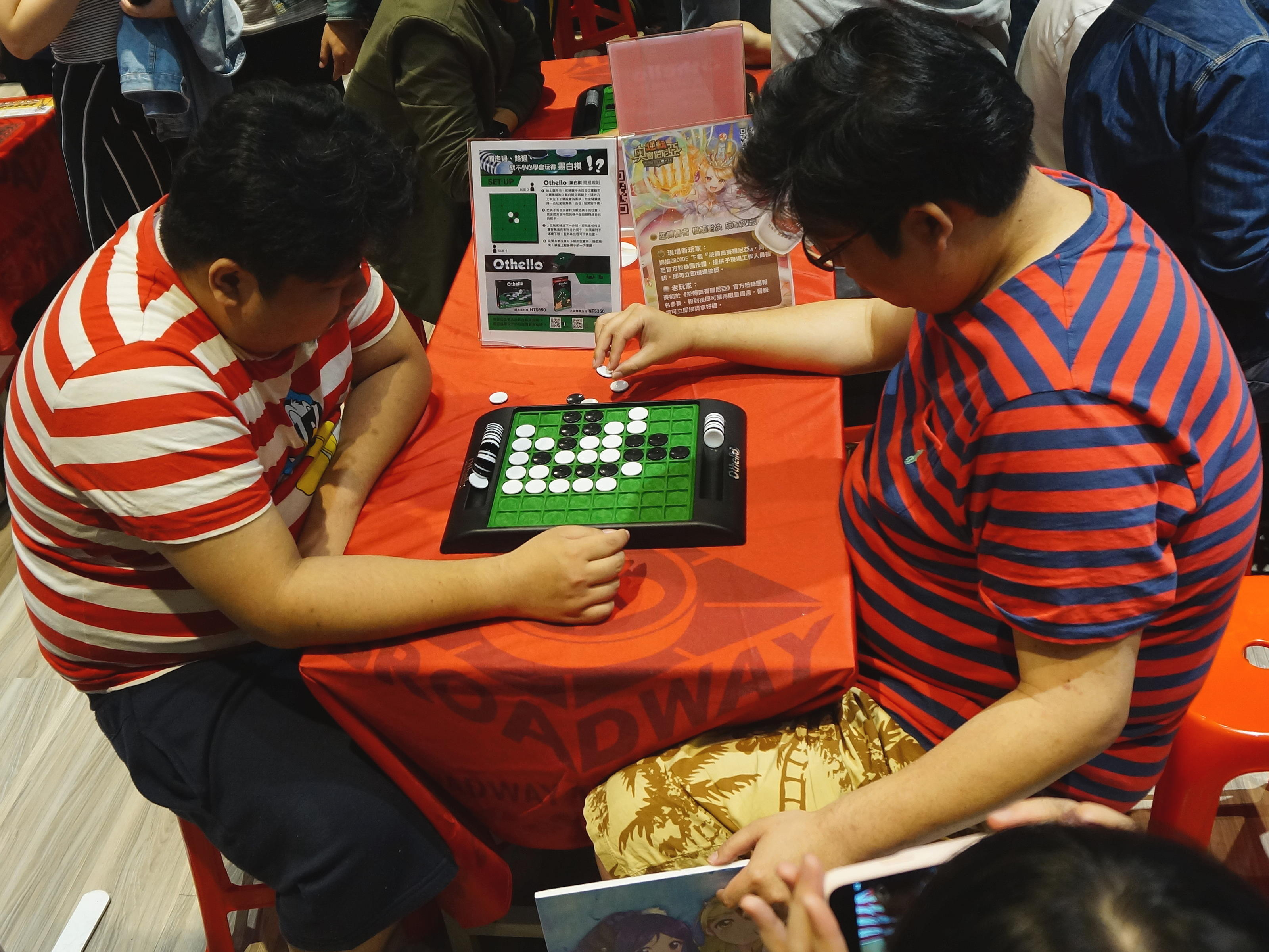 2019年wecanLive遊戲動漫嘉年華桌遊區，網路遊戲實況主「統神」張嘉航（左）、「國動」張葦航（右）玩黑白棋。